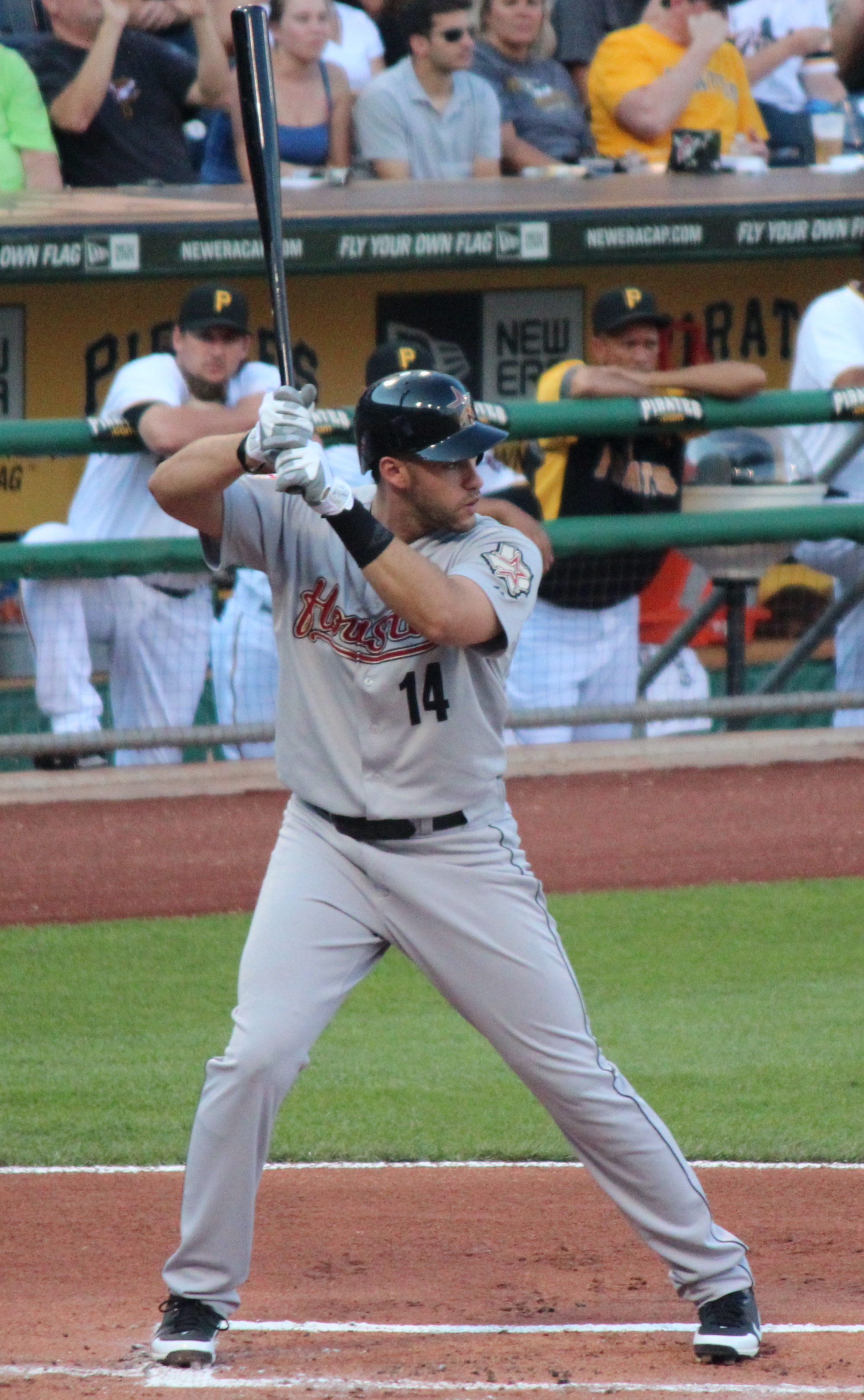 J. D. Martinez